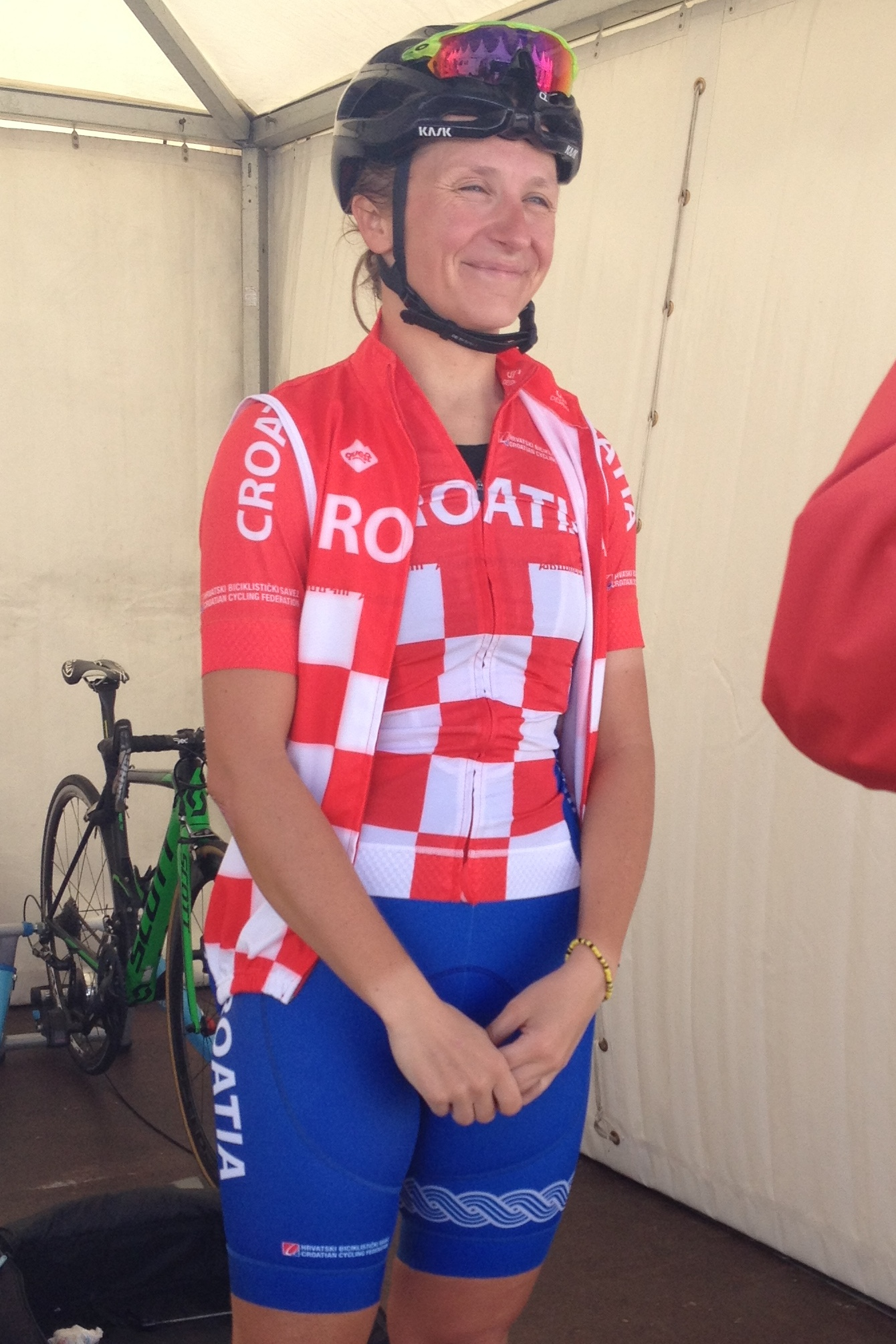 Wegwedstrijd voor vrouwen elite tijdens de Europese kampioenschappen wielrennen in Alkmaar op zaterdag 10 augustus 2019.